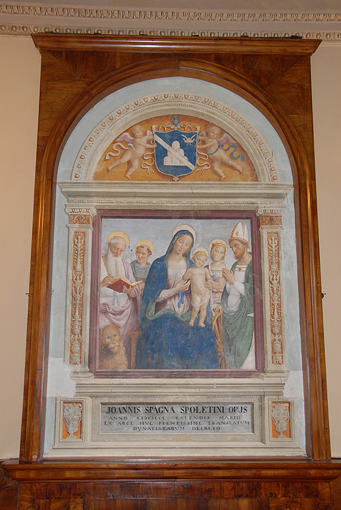 Affresco staccato dalla Rocca Albornoziana di Spoleto nel 1800; dipinto per Pietro Ridolfi, governatore di Spoleto (nella lunetta lo stemma Ridolfi)